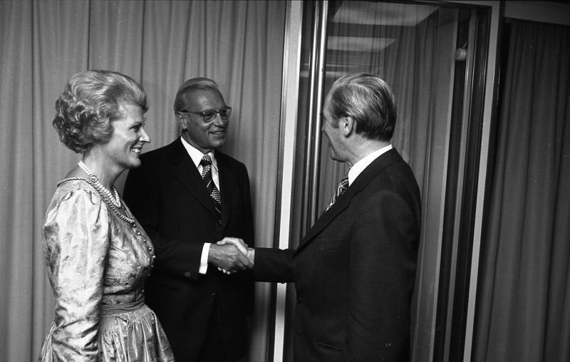 Eröffnung des 140. Oktoberfestes in der Bayerischen Landesvertretung, Bonn (Mitte: Heubl)